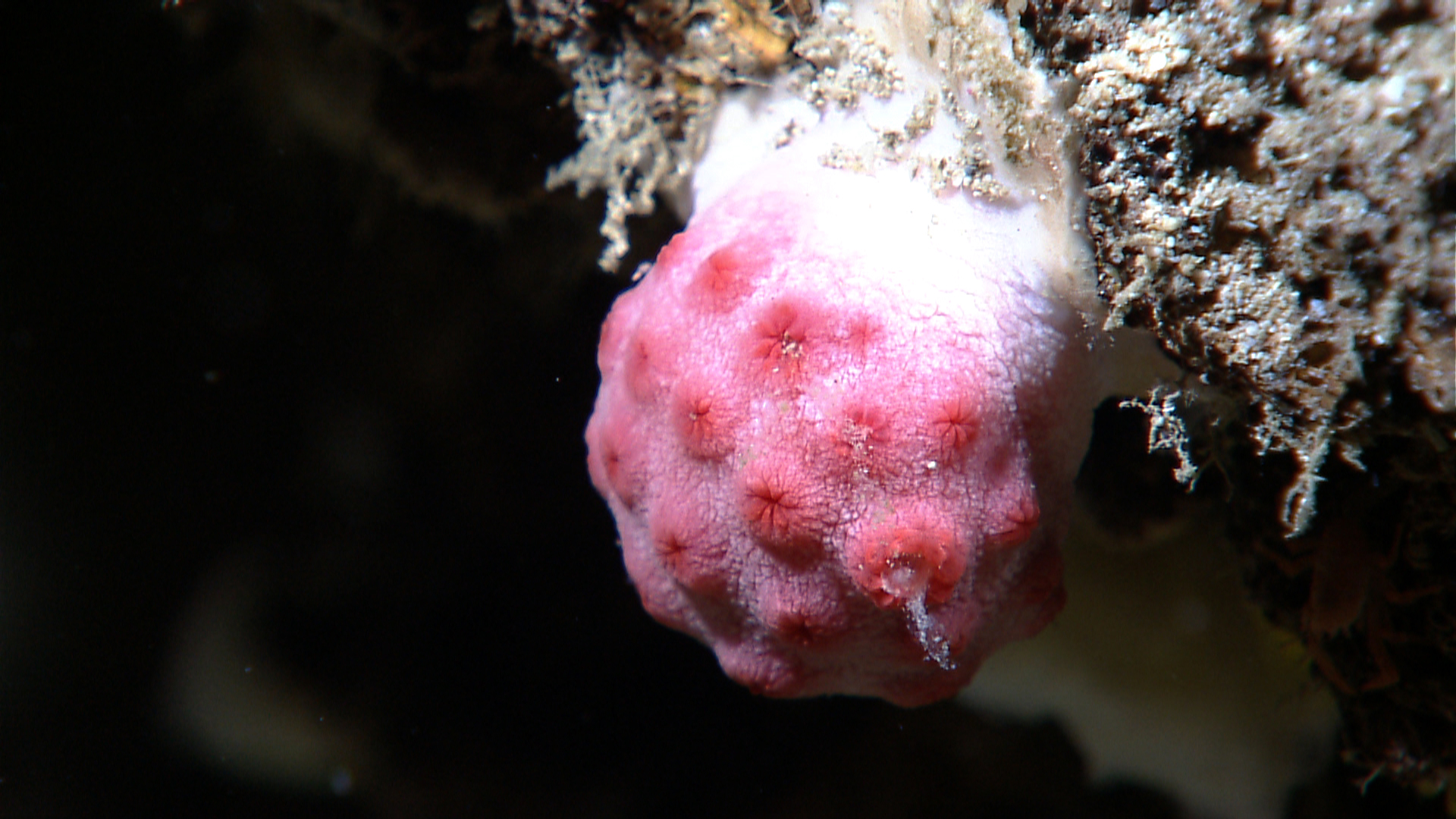 Anthomastus con los pólipos retraidos, en el norte del golfo de México. NOAA 2010